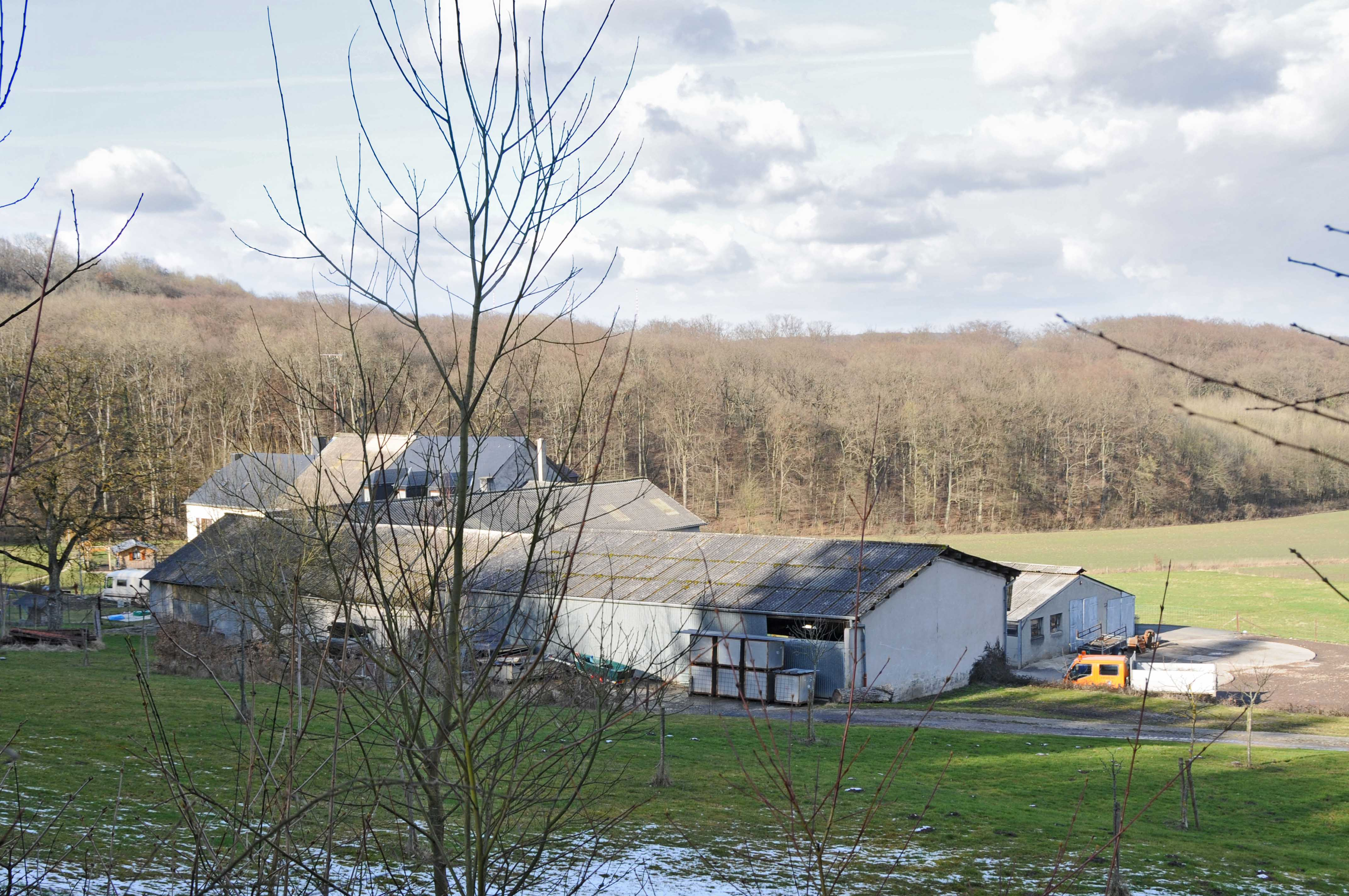 Engelshaff.